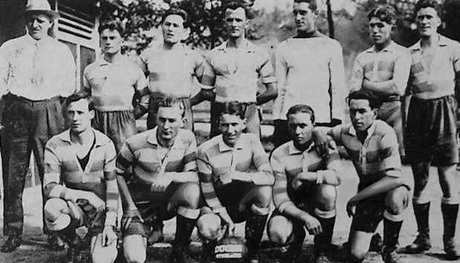 Equipe du FC Sète finaliste de la coupe de France 1923.